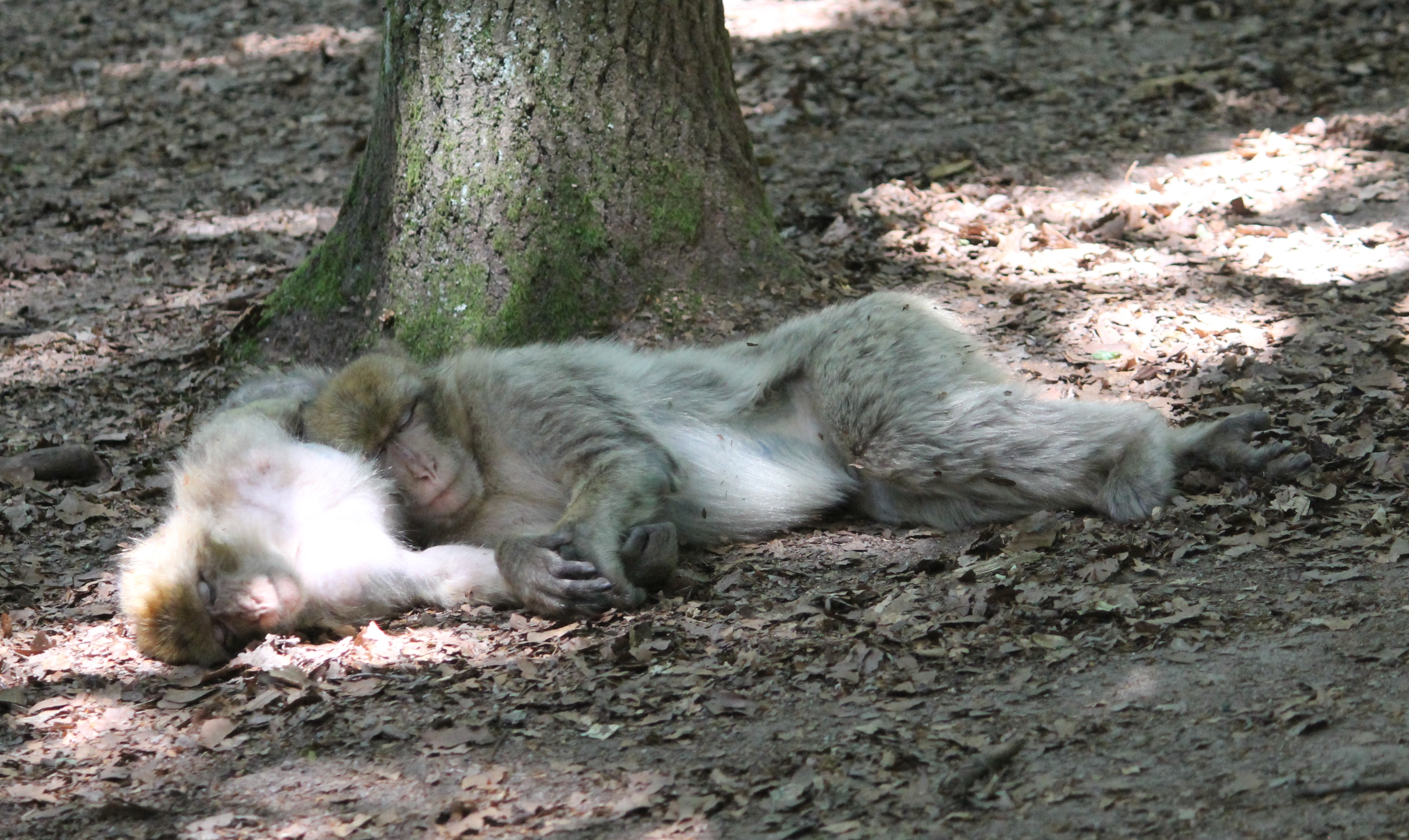 La Montagne des Singes, Kintzheim (2016)